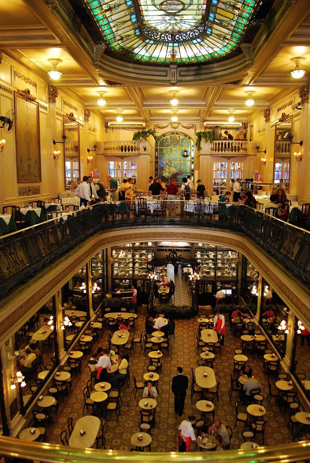 Kavárna Confeitaria Colombo Rio de Janeiro